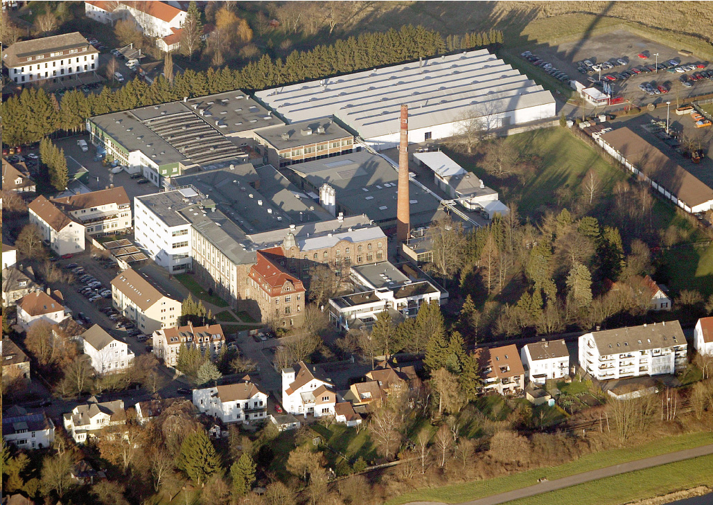 Firmensitz Höxter der Arntz Optibelt Gruppe